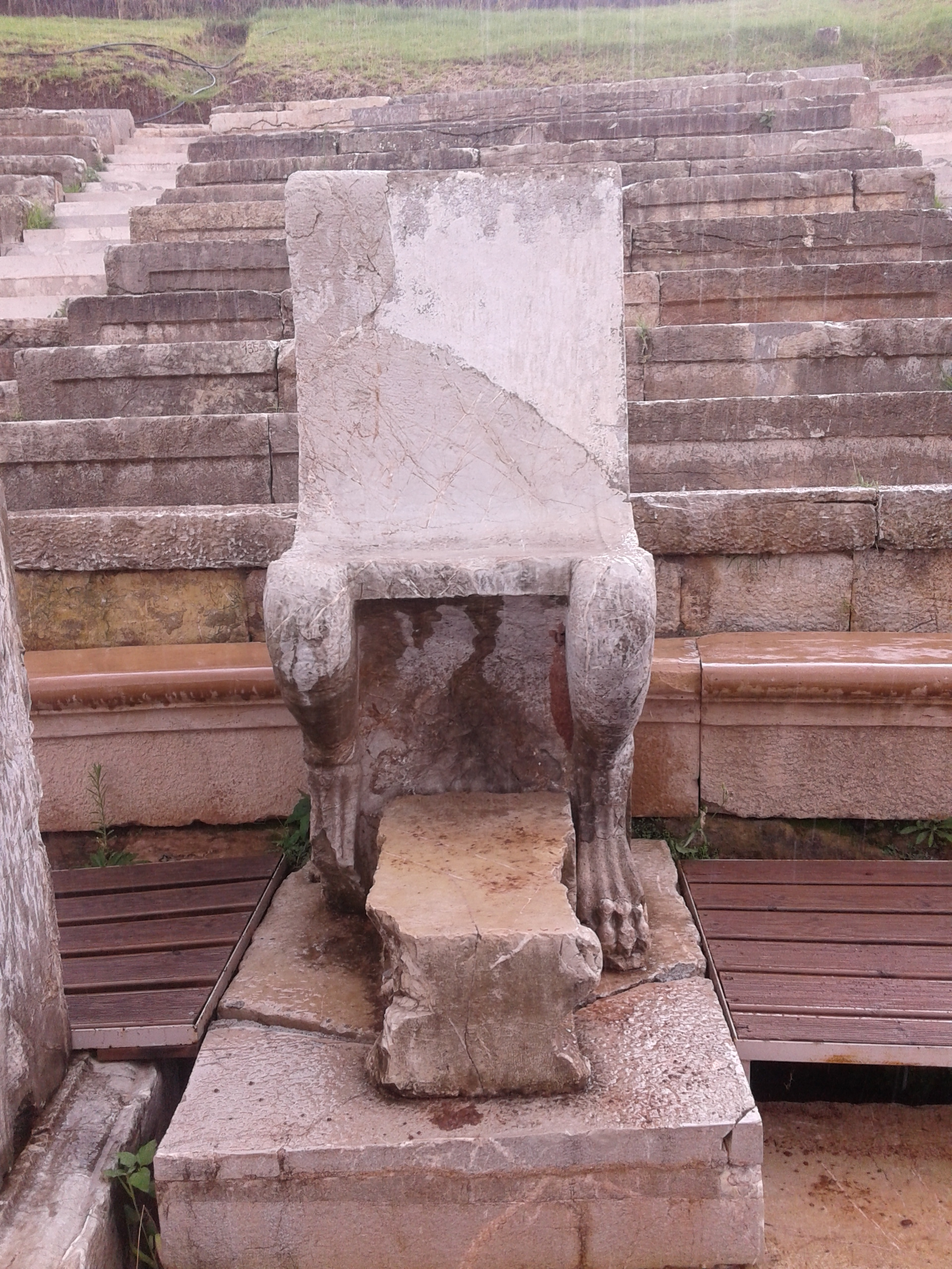 Θέατρο Μεσσήνης. Ένας από τους θρόνους για τους ιερείς του Διονύσου και τους αξιωματούχους, που παρακολουθούσαν τις παραστάσεις.«Θέατρο Μεσσήνης»